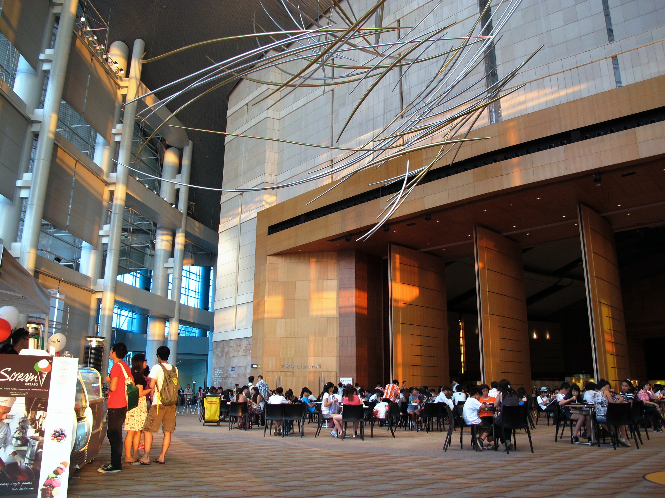 HKCEC Grand Hall